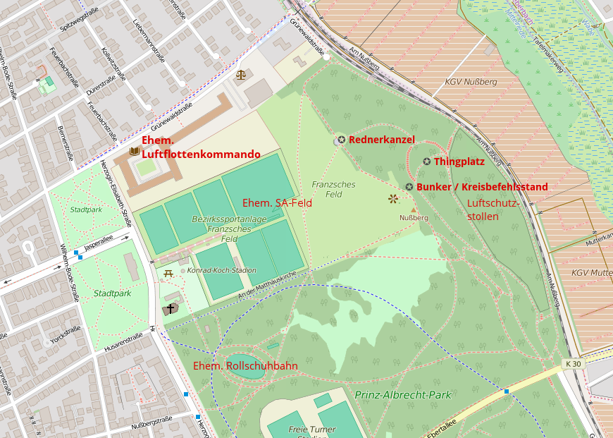 Nussberg und Franzsches Feld in Braunschweig mit Bauwerken aus der Zeit des Nationalsozialismus.